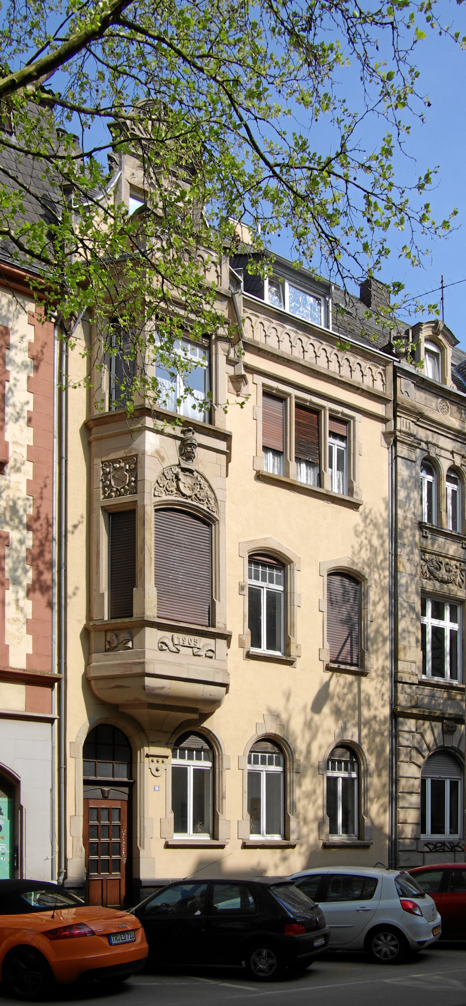 Trier, Bruchhausenstr. 16, dreigeschossiges Zeilendoppelwohnhaus, 1904/05, Architekt August Wolf; Nr. 16 sandsteingegliederter Putzbau, neugotische und Neurenaissance-Motive, Nr. 16a repräsentativer Sandstein(quader)bau; Ausstattung